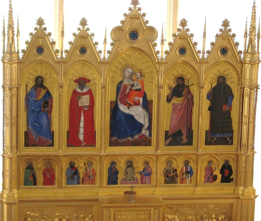 Altarpiece